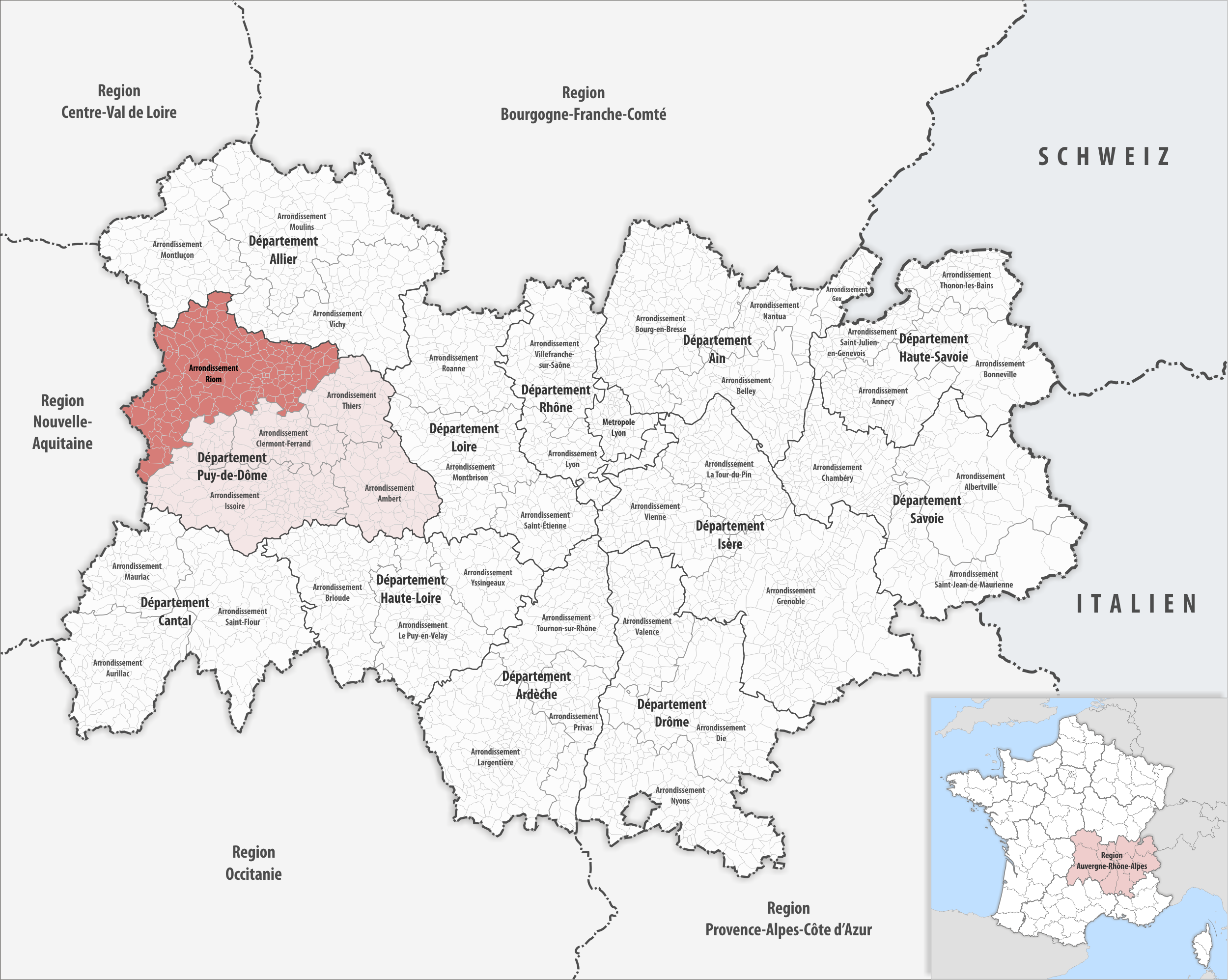 Lage des Arrondissements Riom